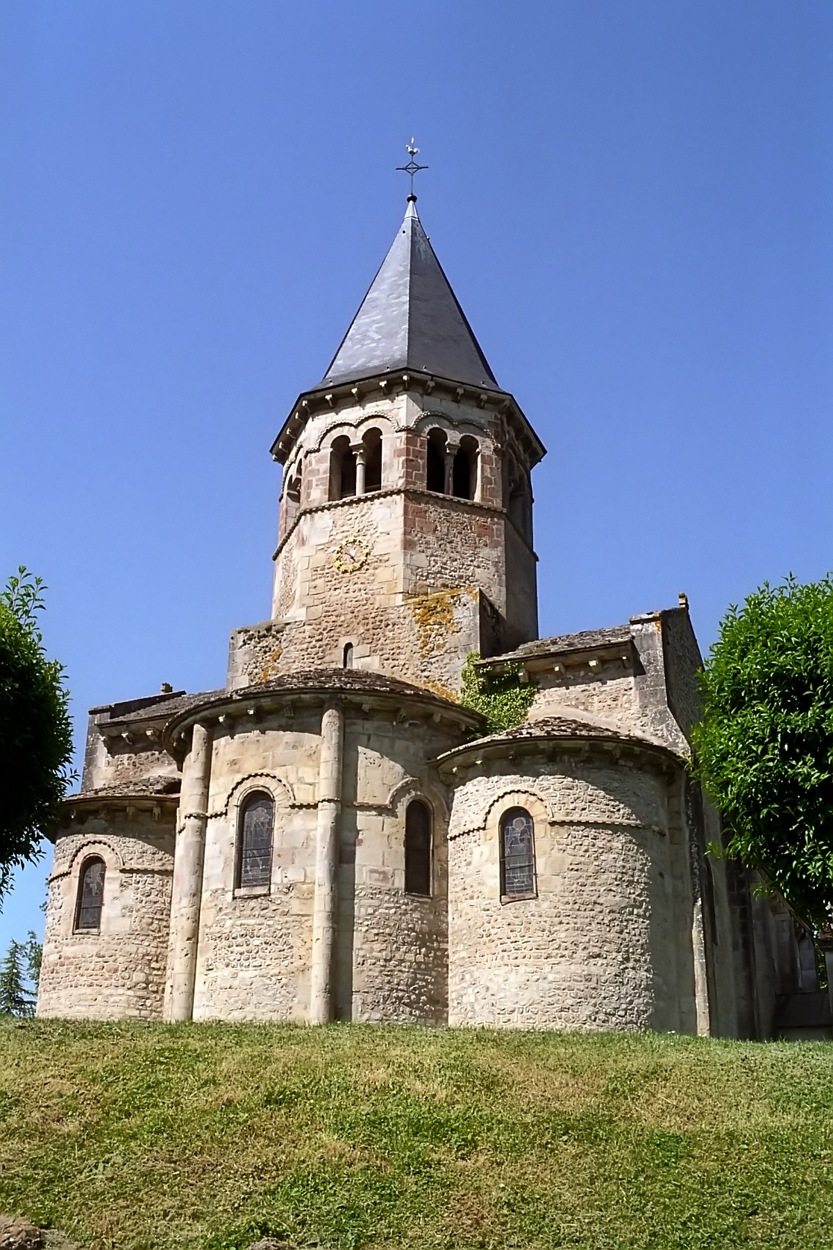 France - Allier - Église Saint-Symphorien de Biozat